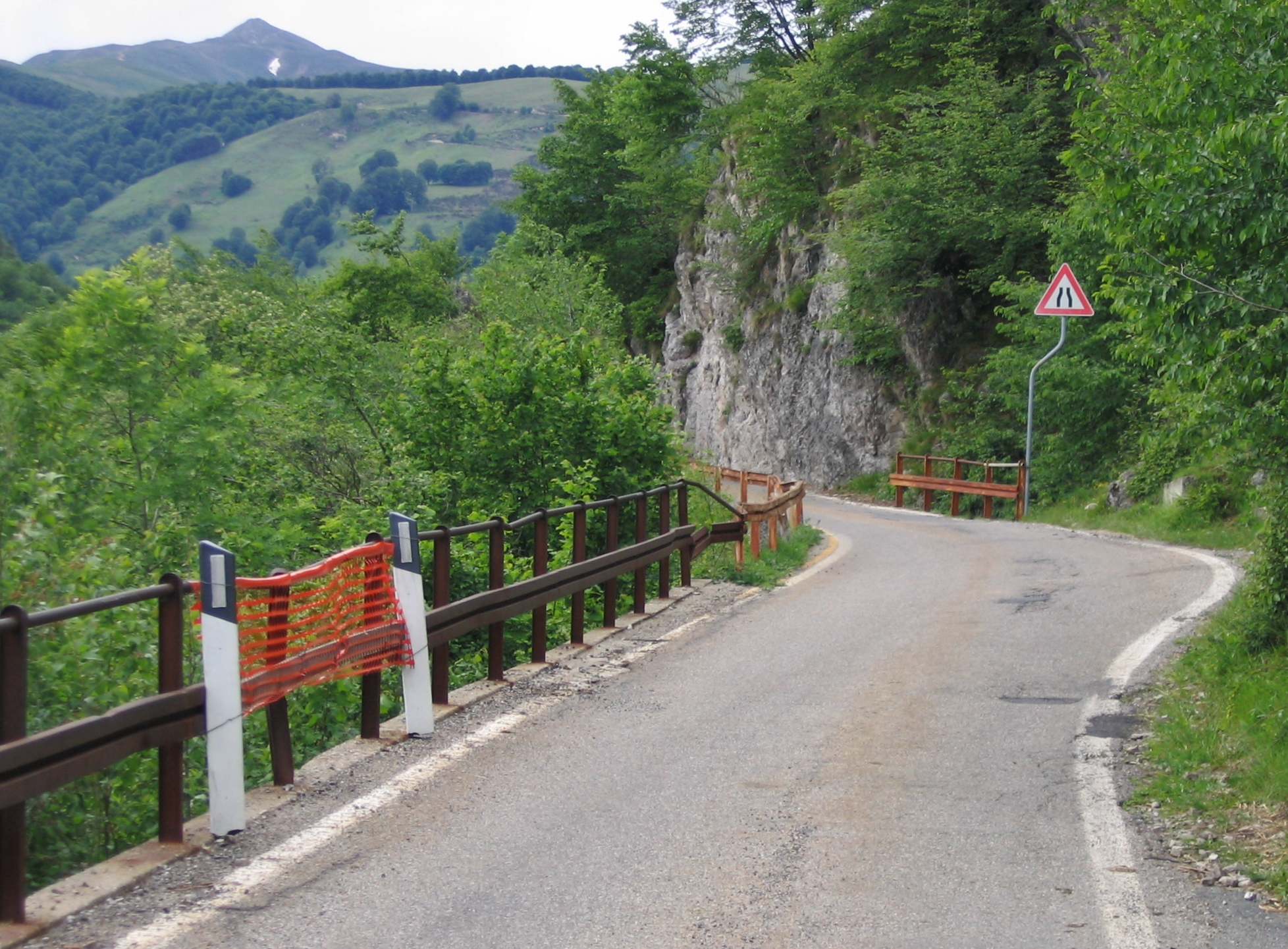 Straße